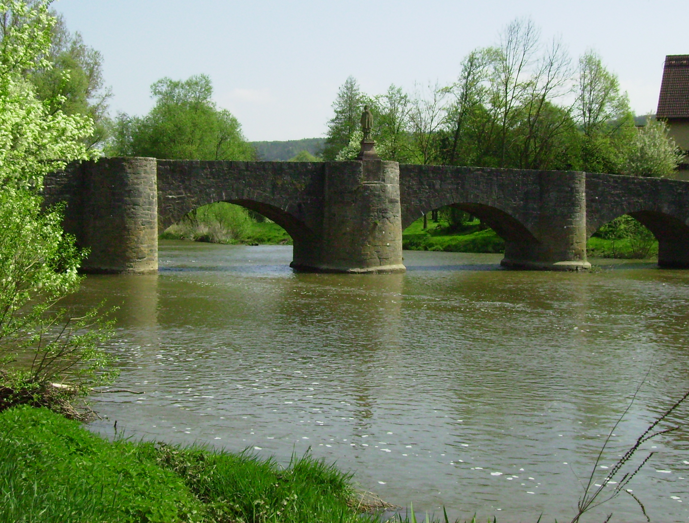 die Brücke von Tauberrettersheim, gebaut unter der Leitung des Würzburger Hofbaumeisters Balthasar Neumann